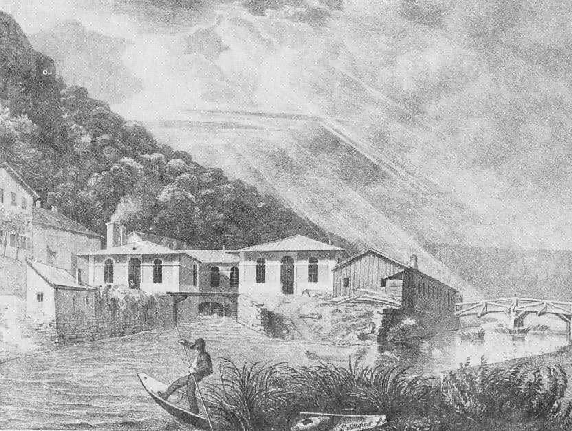 Eisenhammerwerk Hagenacker an der Altmühl im Landkreis Eichstätt. Lithographie von Emil Büttner, um 1835